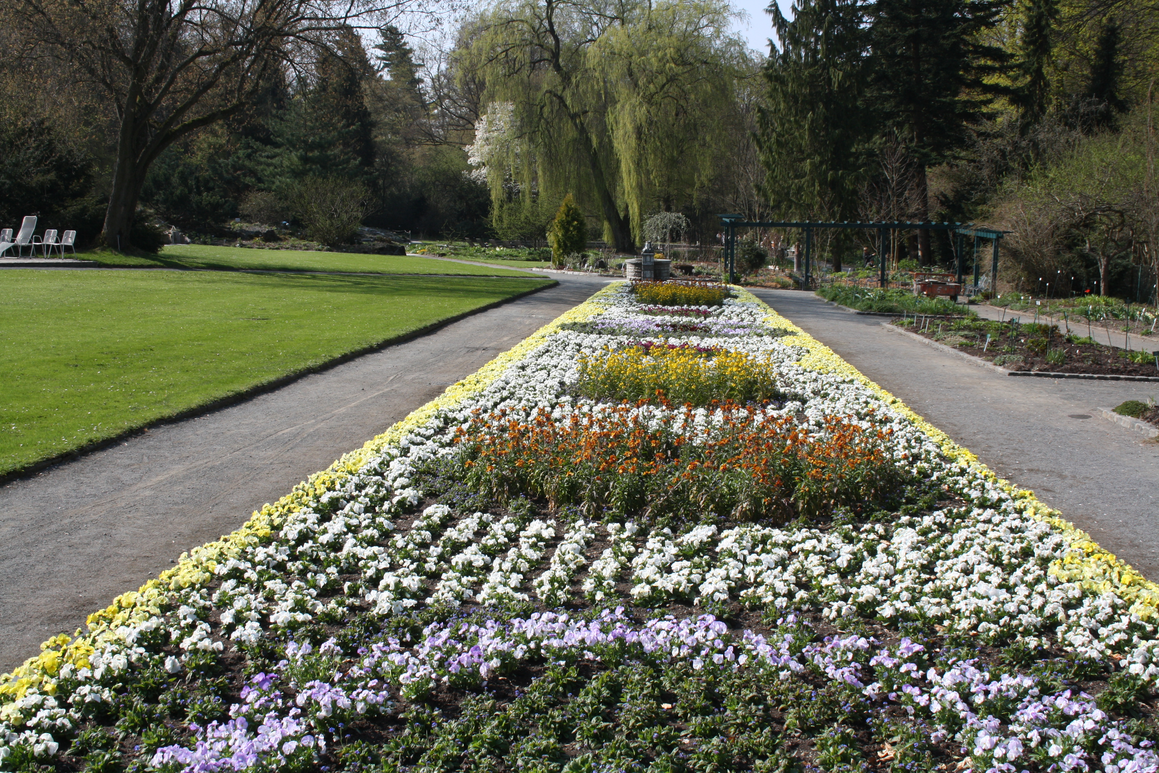 Botanischer Garten im Hofer Stadtpark am Theresienstein